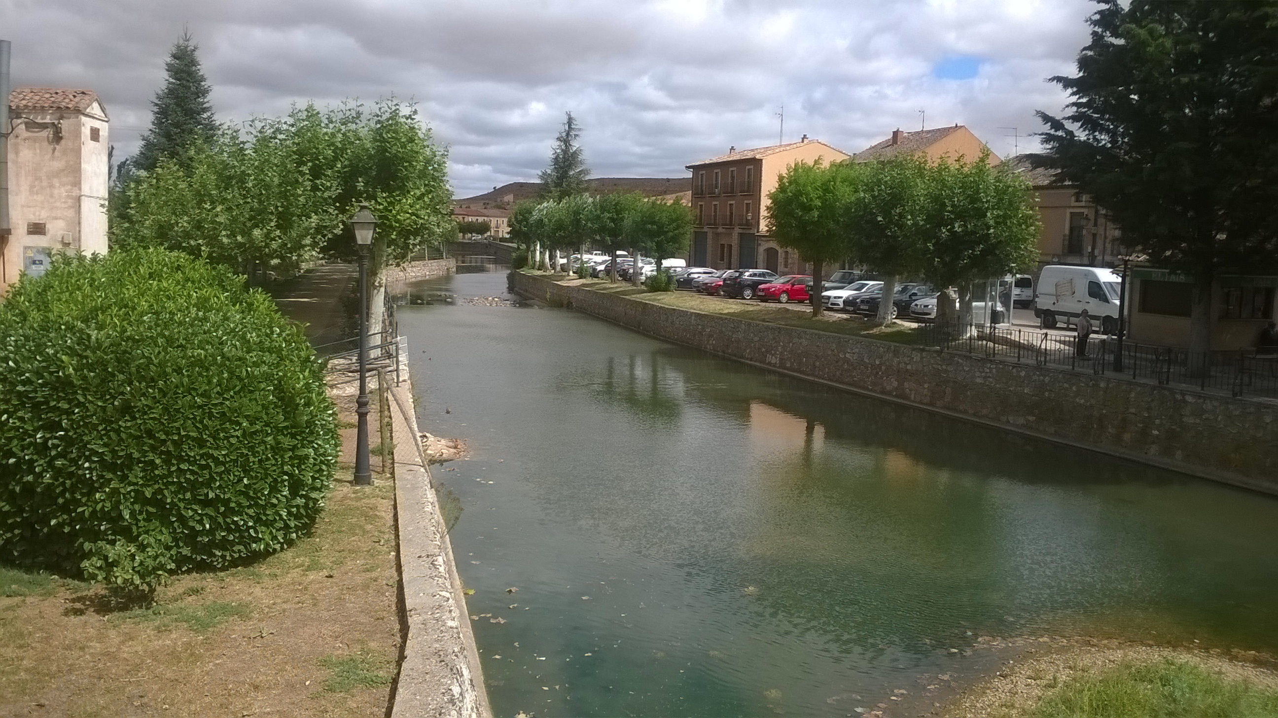 Rio Aguisejo a su paso por Ayllón (Segovia-España)